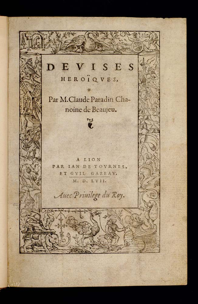 Devises heroïques címlapja